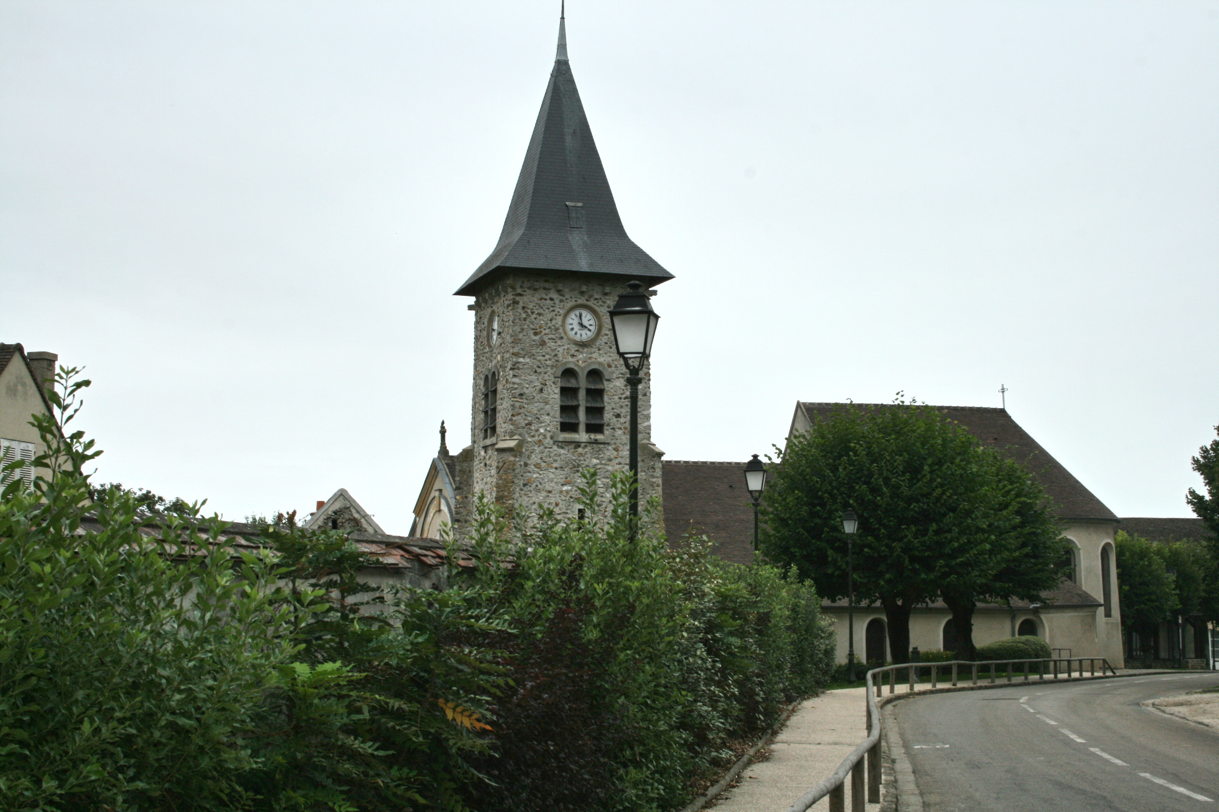 Sur la place du village, faisant face à la mairie, l'église Saint-Pierre où fut baptisé Louis Braille le 6 janvier 1809 et où eurent lieu les derniers honneurs accordés à ce génie avant son ultime voyage au Panthéon à Paris.(Coupvray, Seine-et-Marne, région Île-de-France).